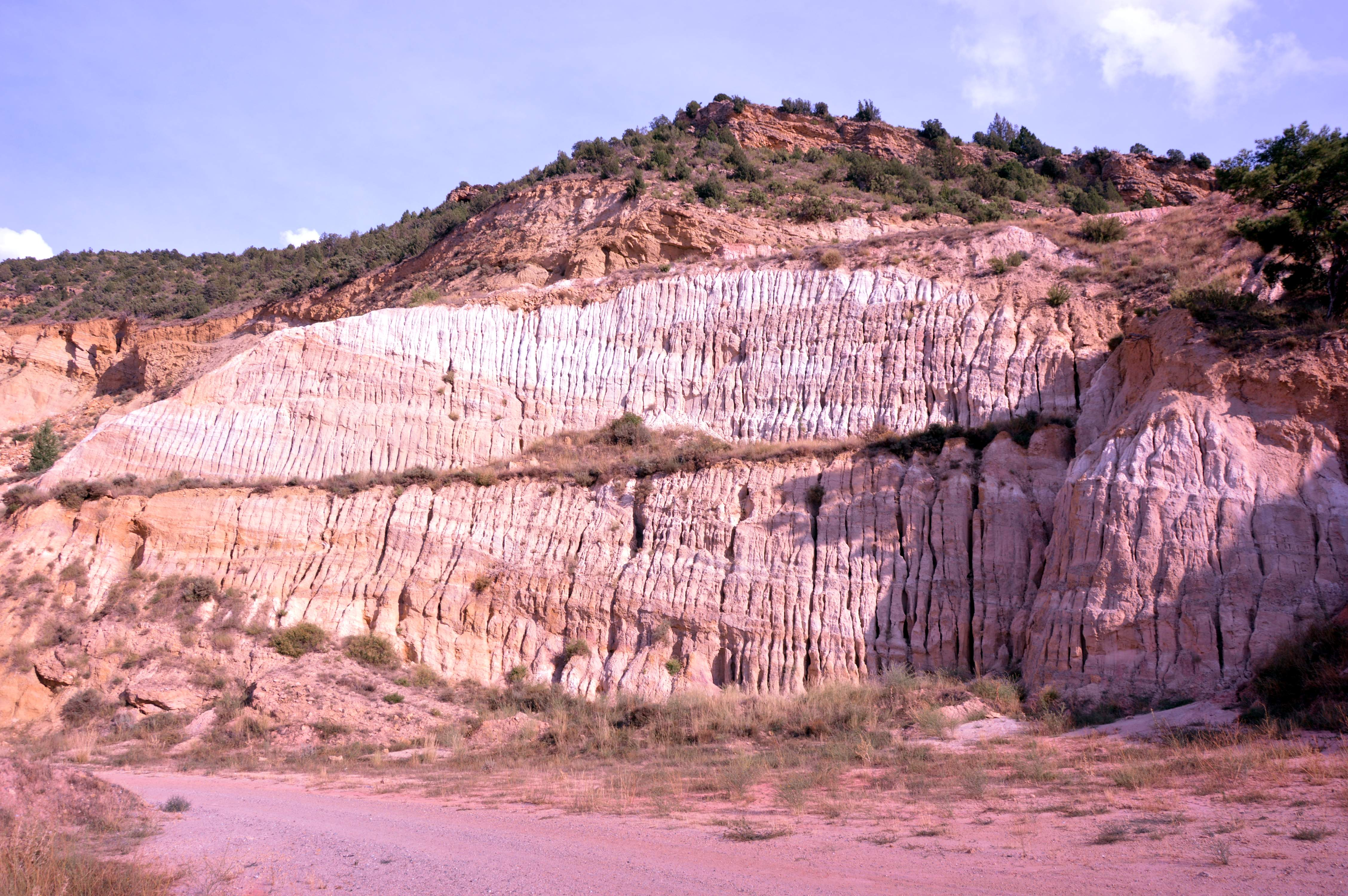 Frente de mina en la Ruta Geológica del Parque Natural de Puebla de San Miguel (2017).